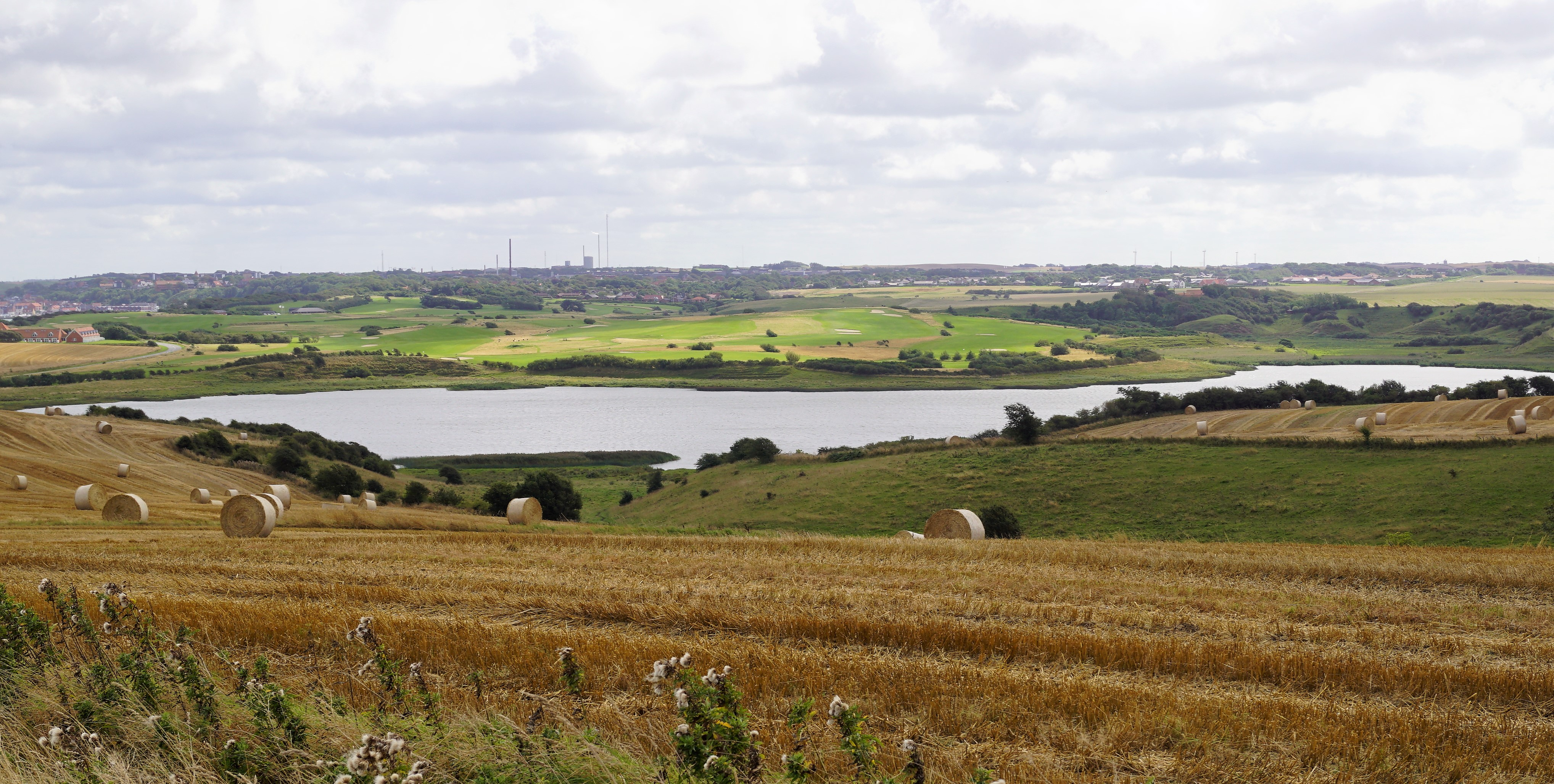 Hornsø set fra nord